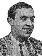 Diego Mazquiaran Torrontegui fortuna.JPG